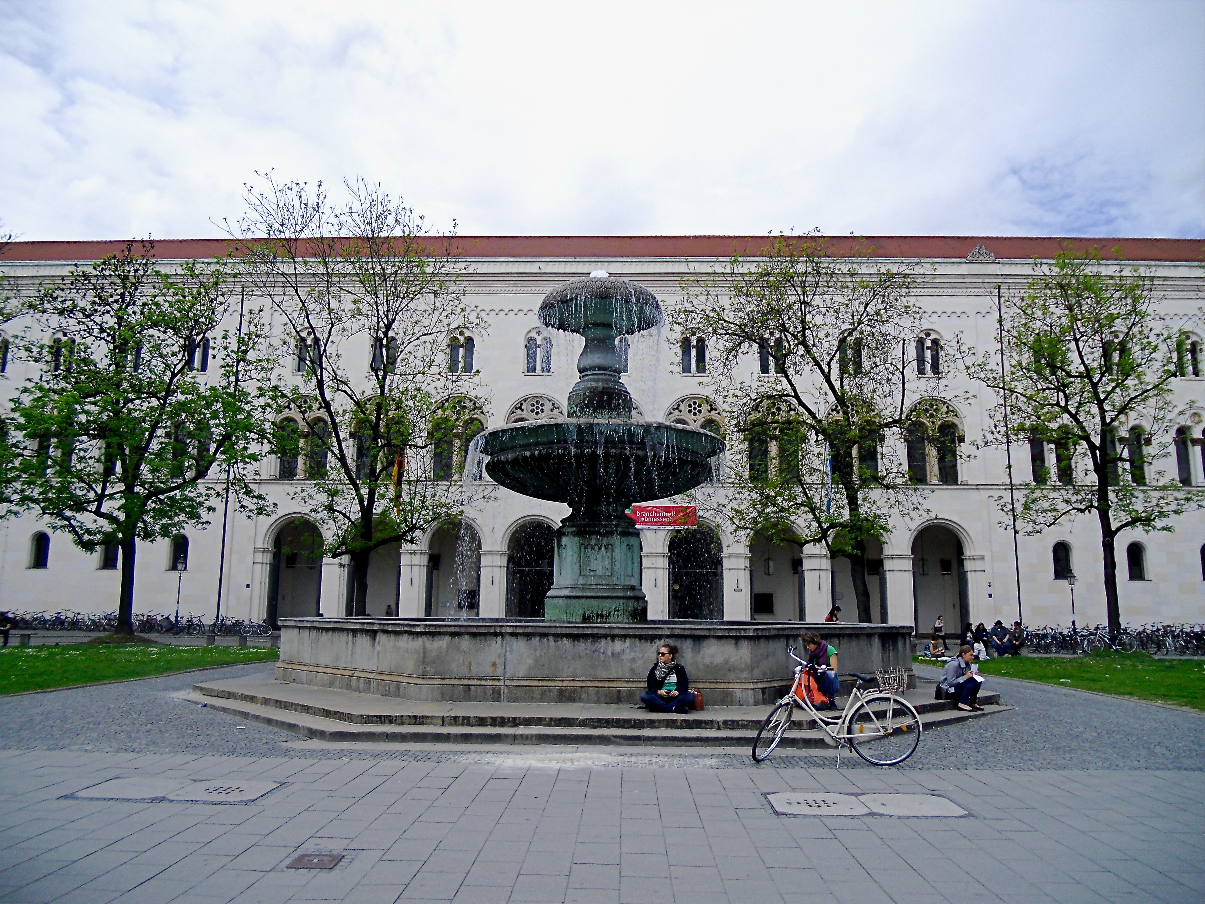 Frontfassade des Hauptgebäudes der Ludwig-Maximilians-Universität München